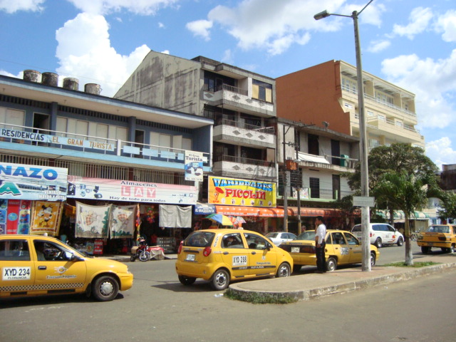 Calle 16 en el centro de Florencia